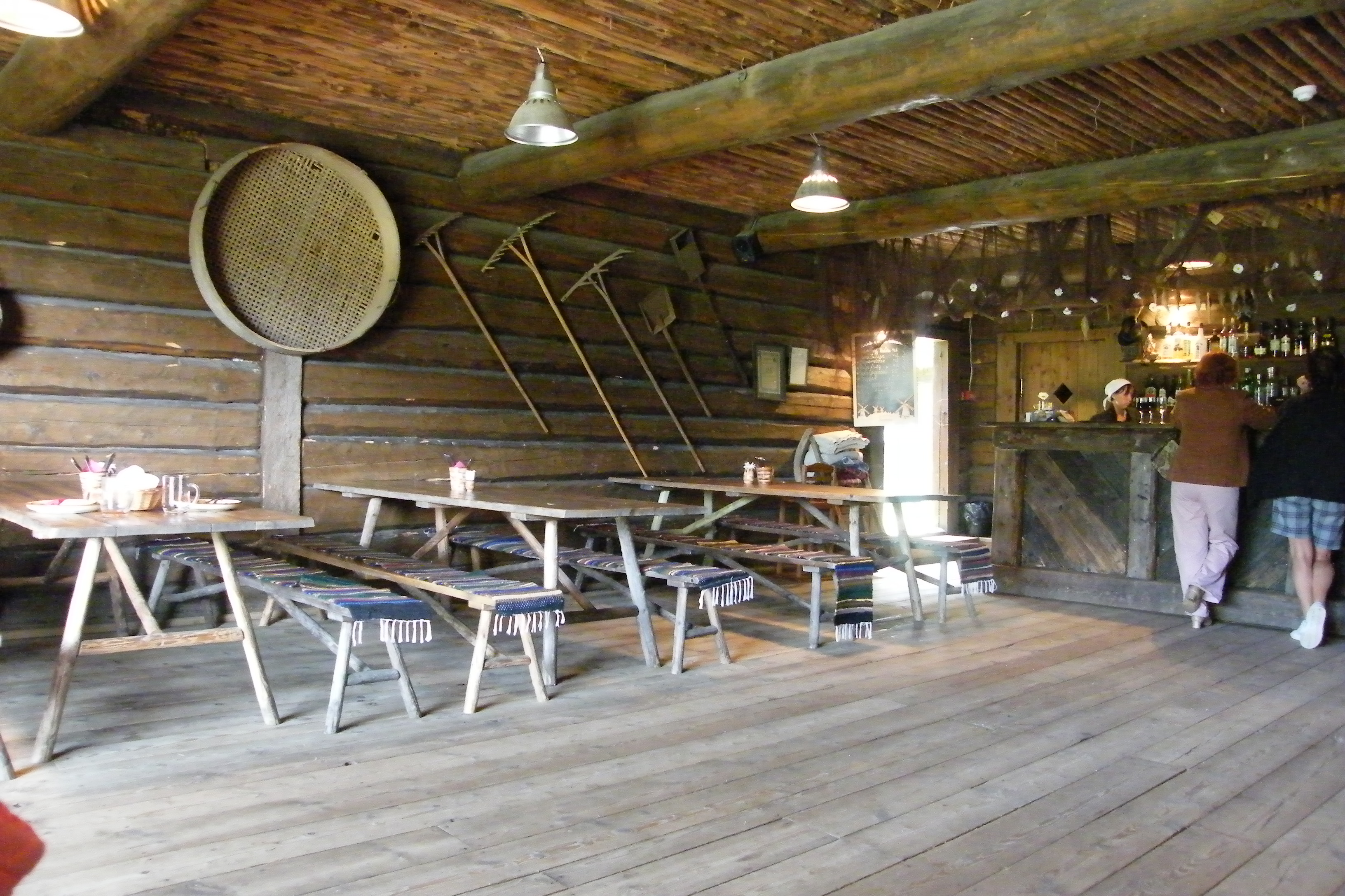 Altja kõrts